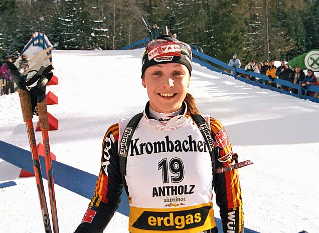 Magdalena Neuner, Deutschland